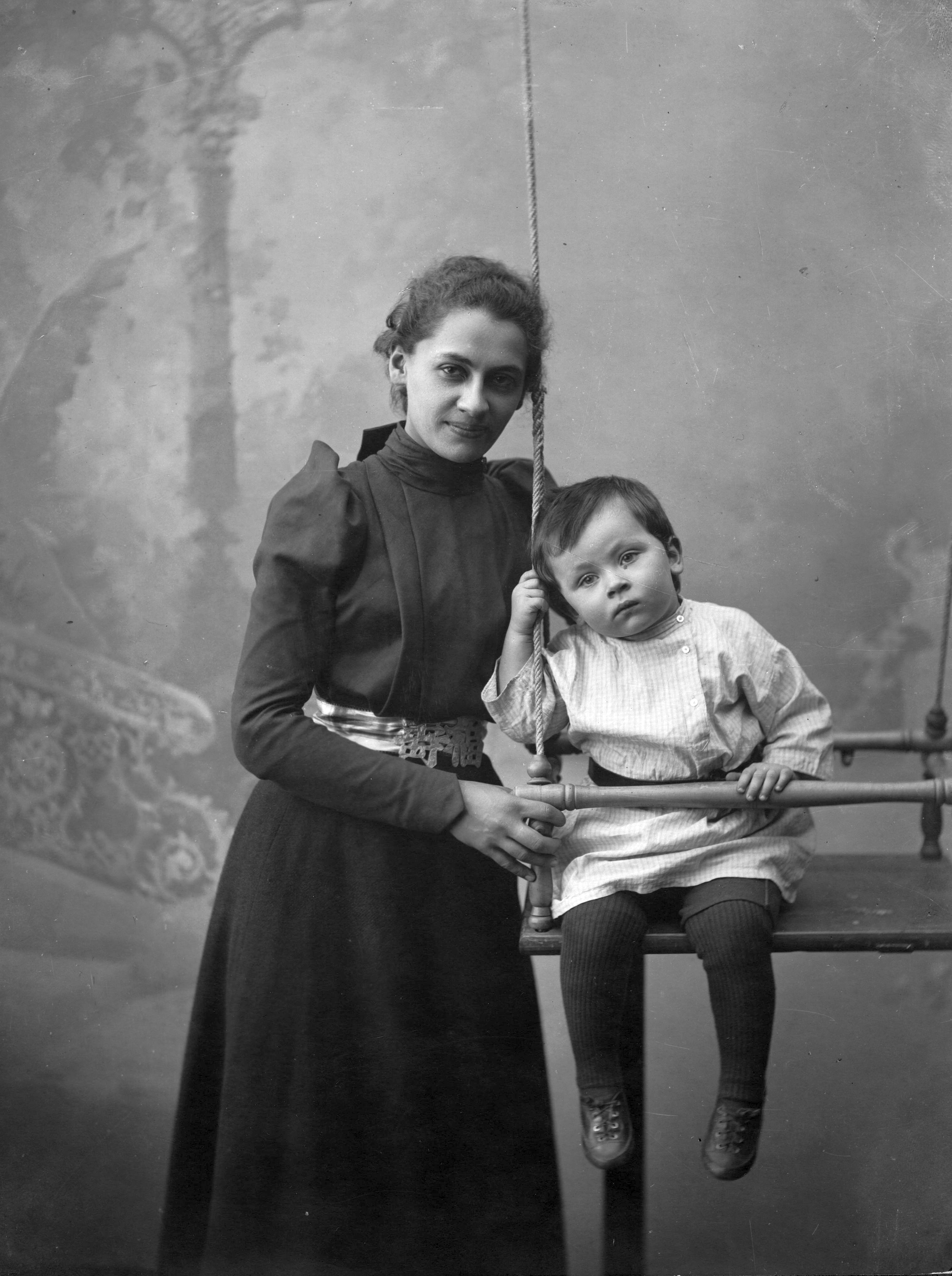 Е. П. Пешкова, жена А. М. Горького, с сыном Максимом г. Нижний Новгород. 1900.